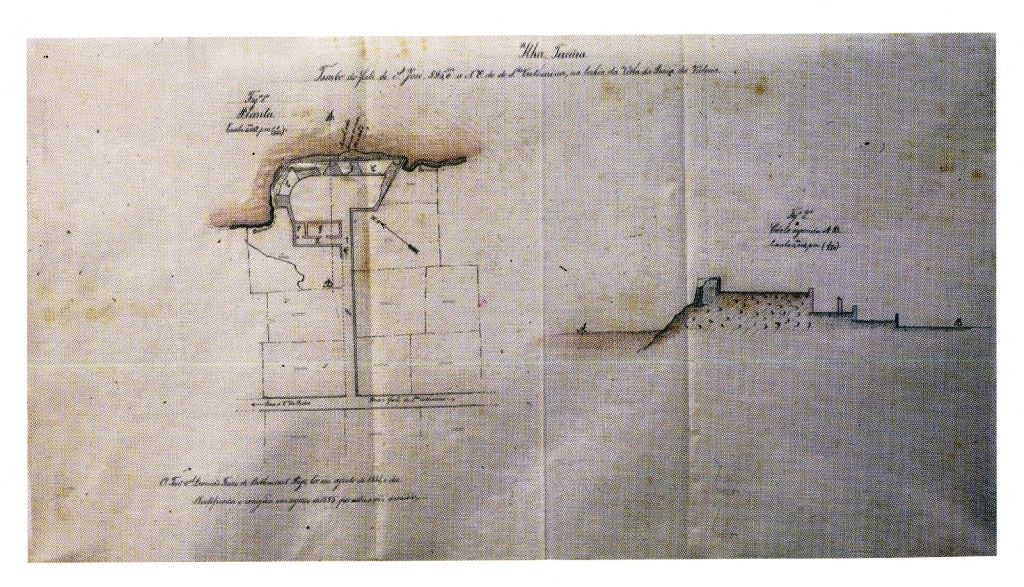 "Tombo do Forte de S. José... na bahia da Villa da Praia da Vitória", Ilha Terceira (Açores), Portugal.